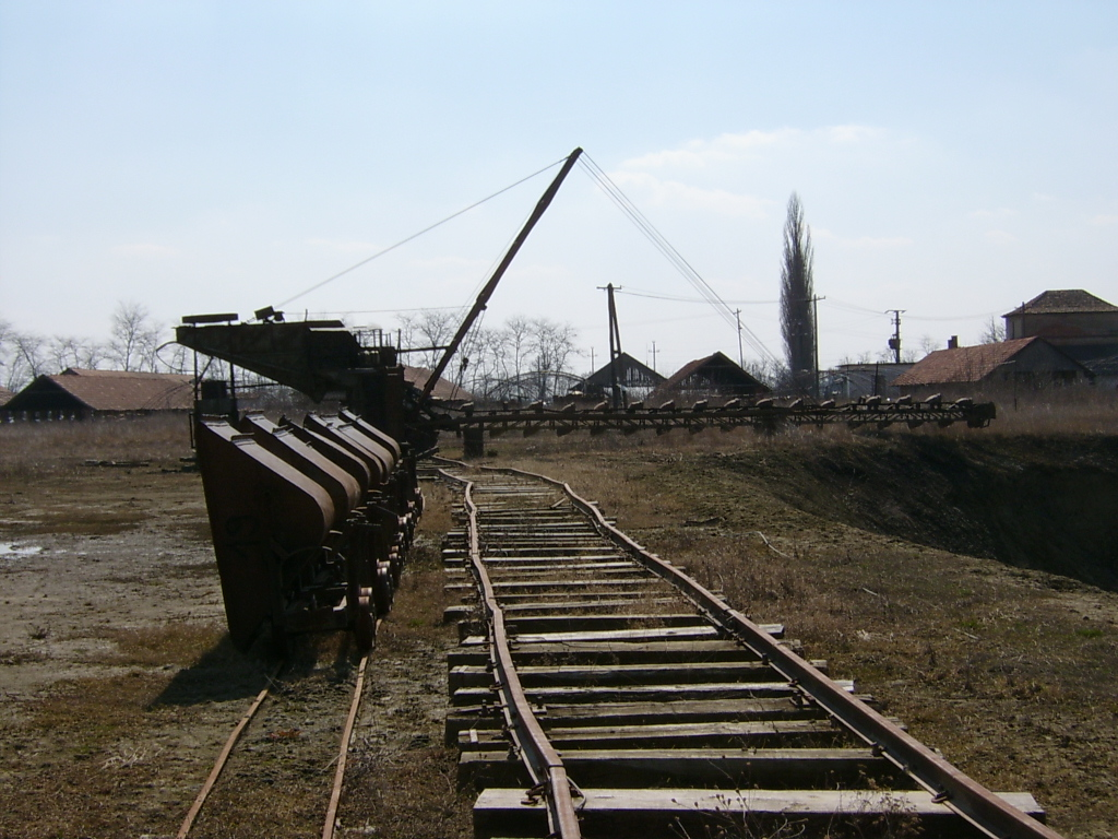 Bányagép és csillesor a békési téglagyárban, annak leállítása után